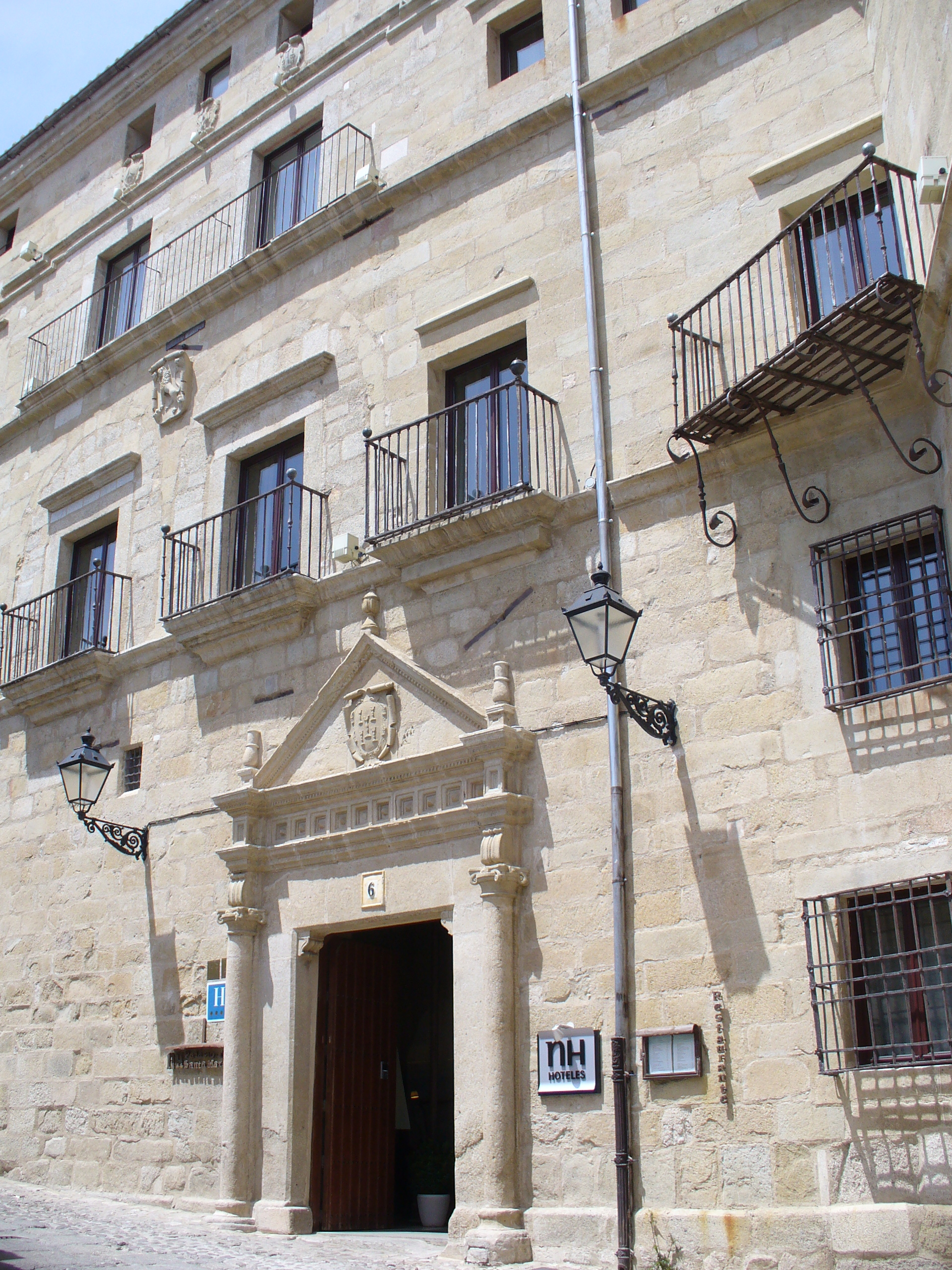 Palacio de Santa Marta en Trujillo (provincia de Cáceres, España), actualmente hotel de NH Hoteles